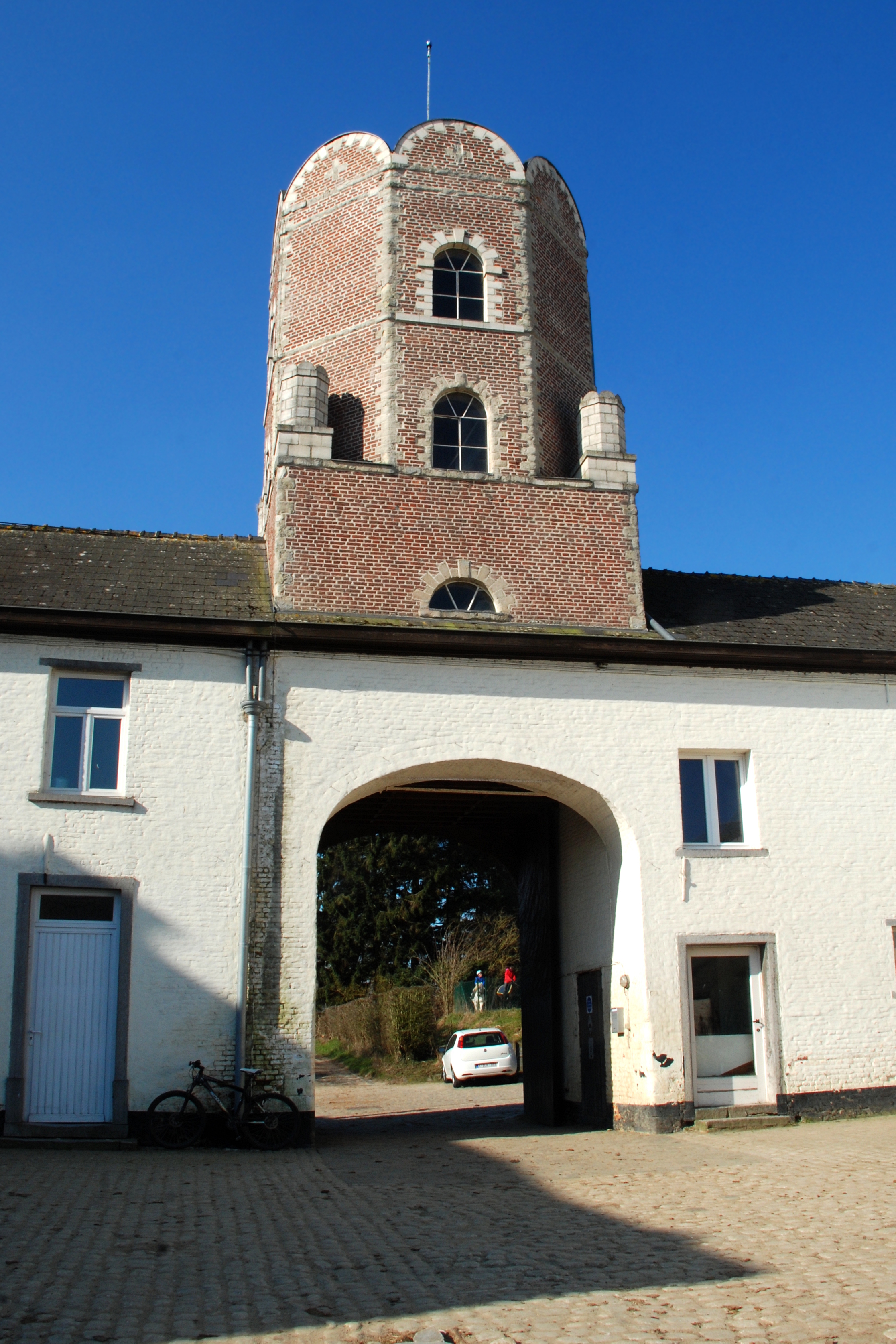 Belgique - Brabant wallon - Site de la bataille de Waterloo - Ferme de la Papelotte